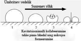 Kavitatsioonimulli kollabeerumine ning mikrojoa formeerumine